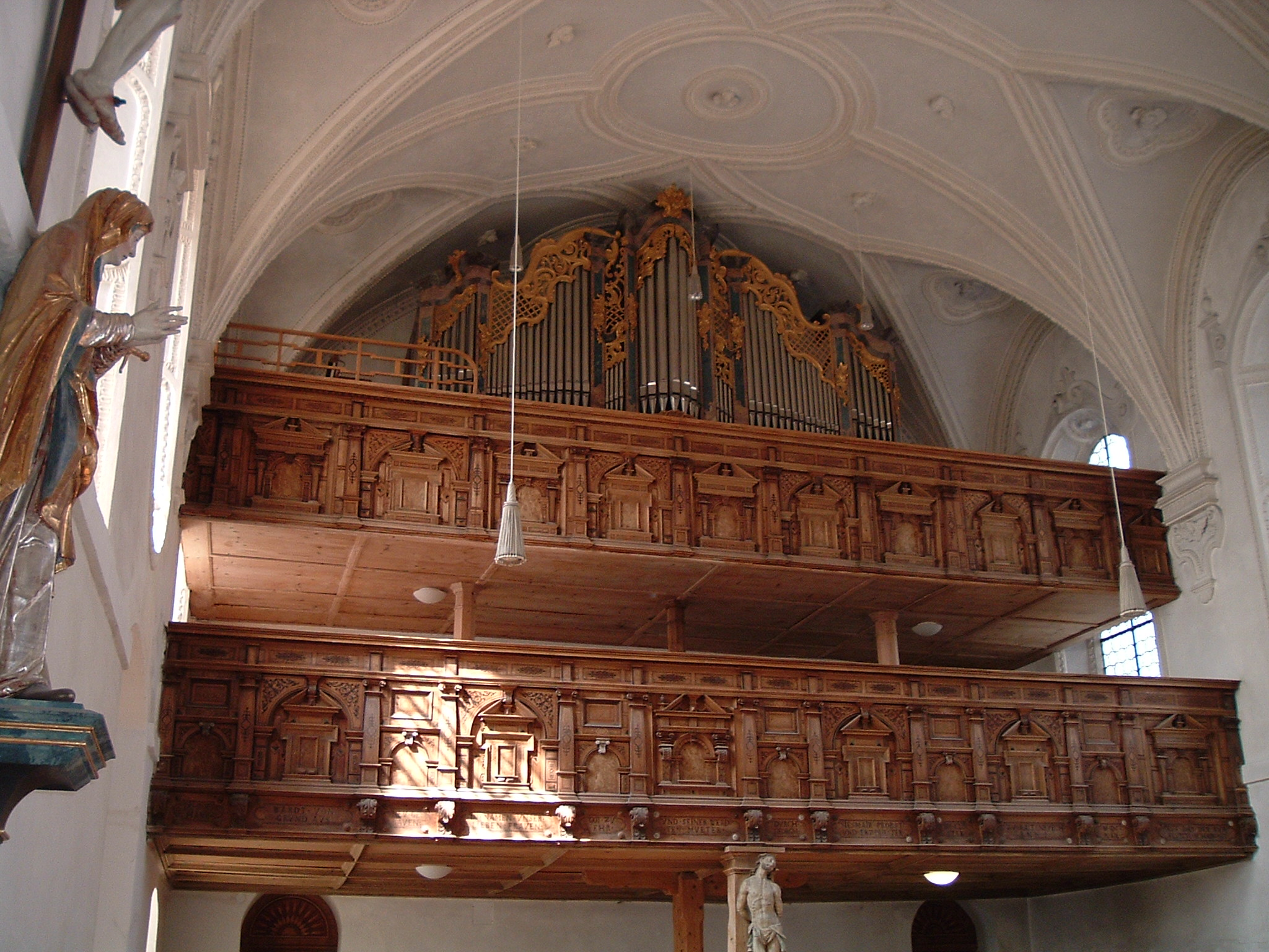 Eglise de pélérinage de Hoher Peissenberg